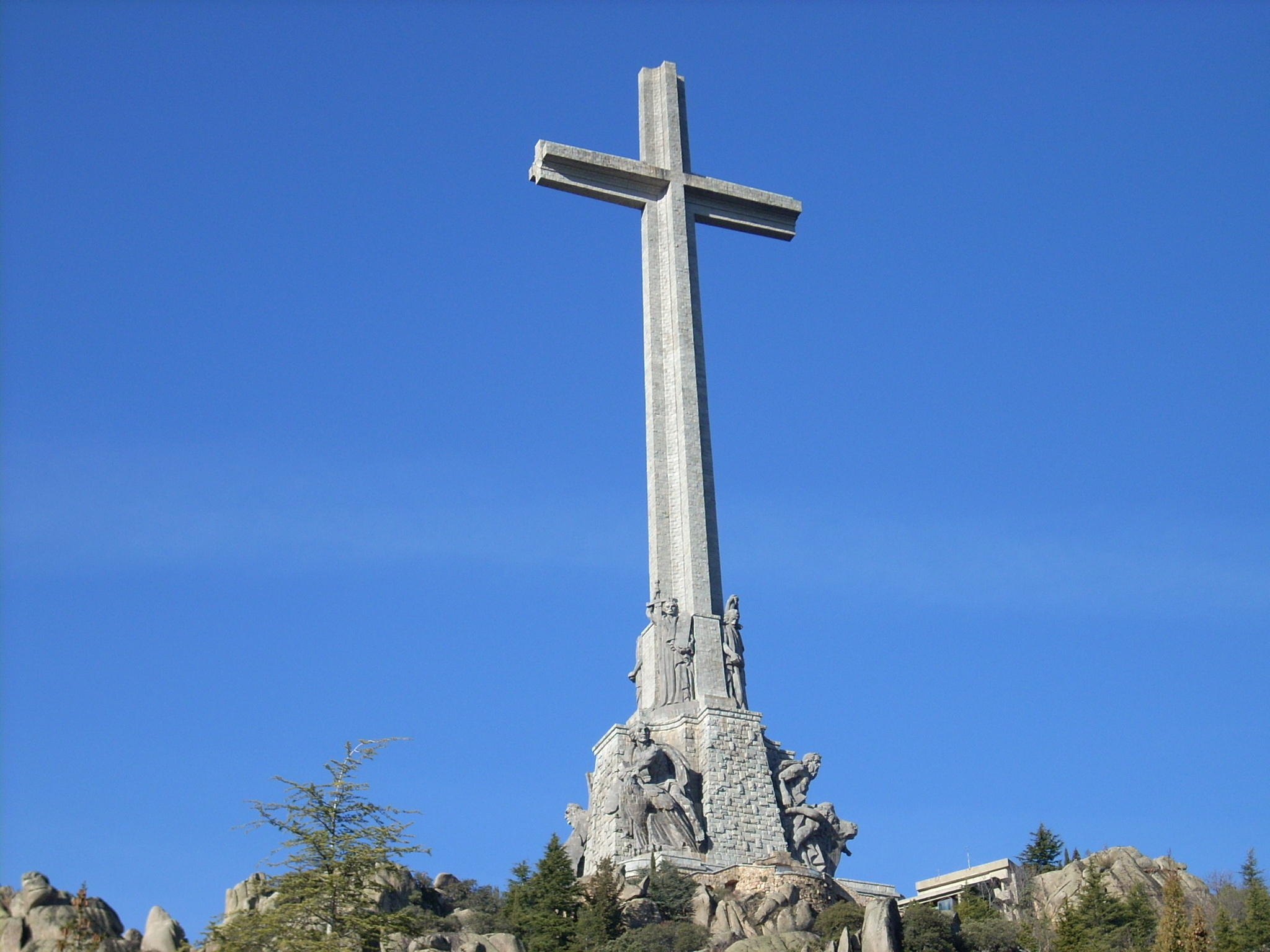 Vista frontal panorámica de la Santa Cruz del Valle de los Caídos.